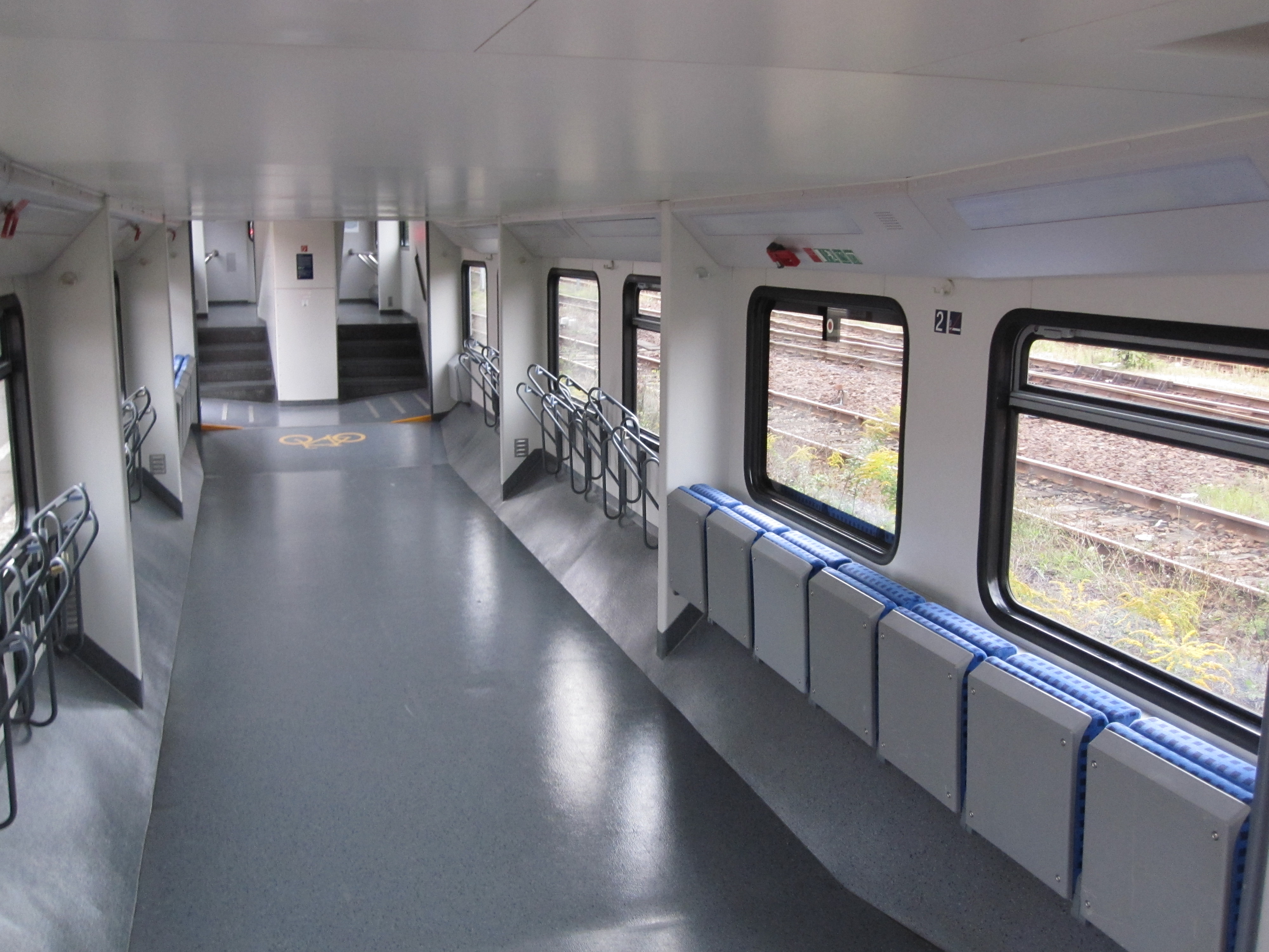 Doppelstockwagen Fahrradexpress DBuza748 - untere Ebene